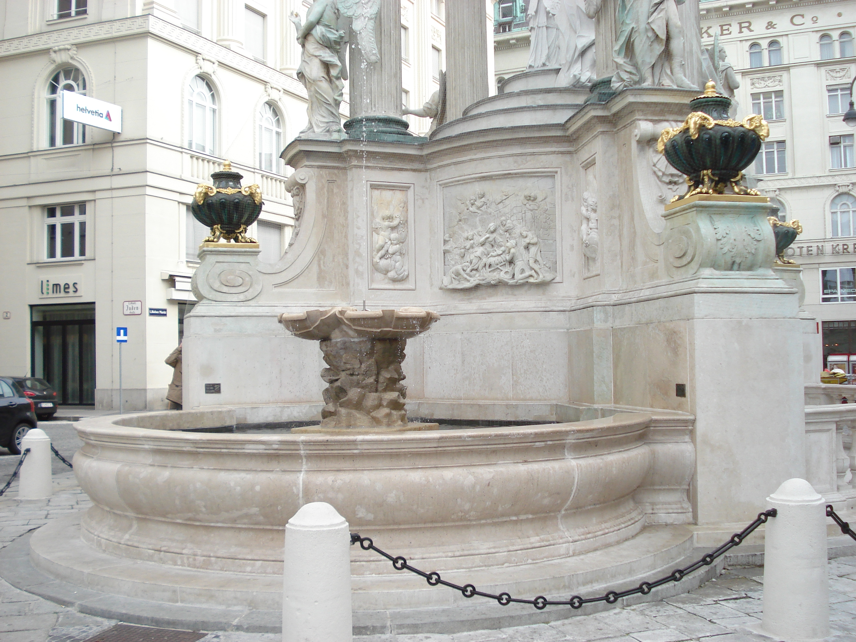 Vermählungsbrunnen2